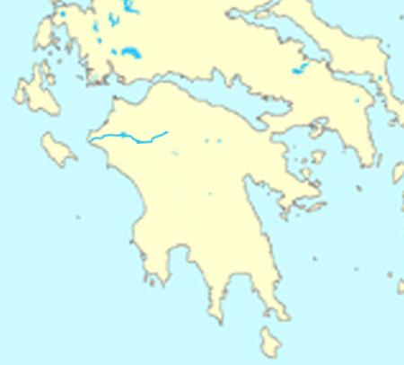 Πηνειός Ηλείας